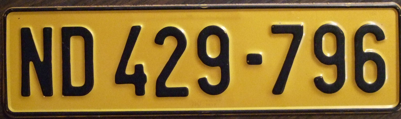 SOUTH AFRICA, NATAL PROVINCE, Durban 1968 series passenger plate